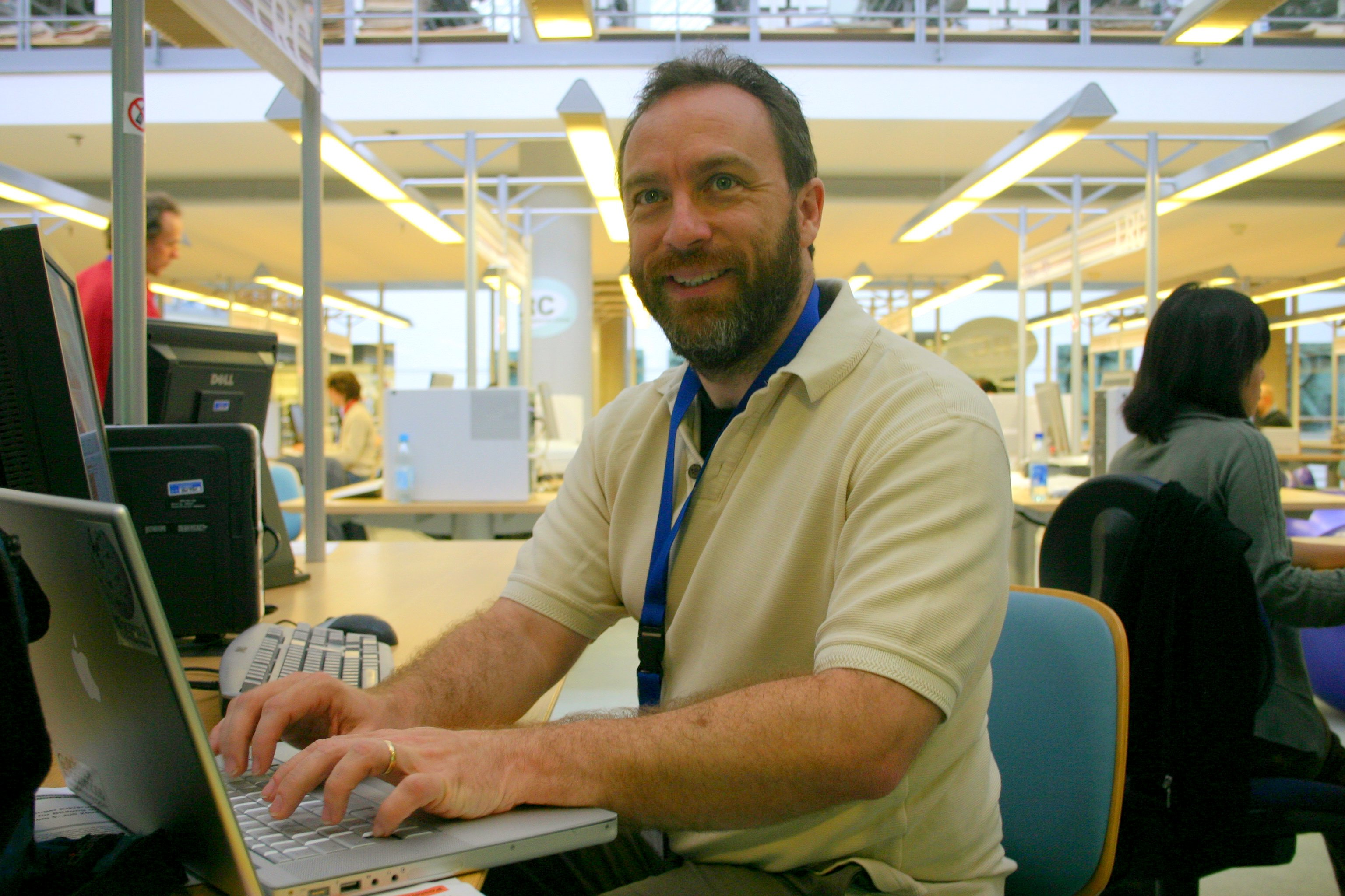 Wikipedia Academy, June 17, 2006, Göttingen, Germany